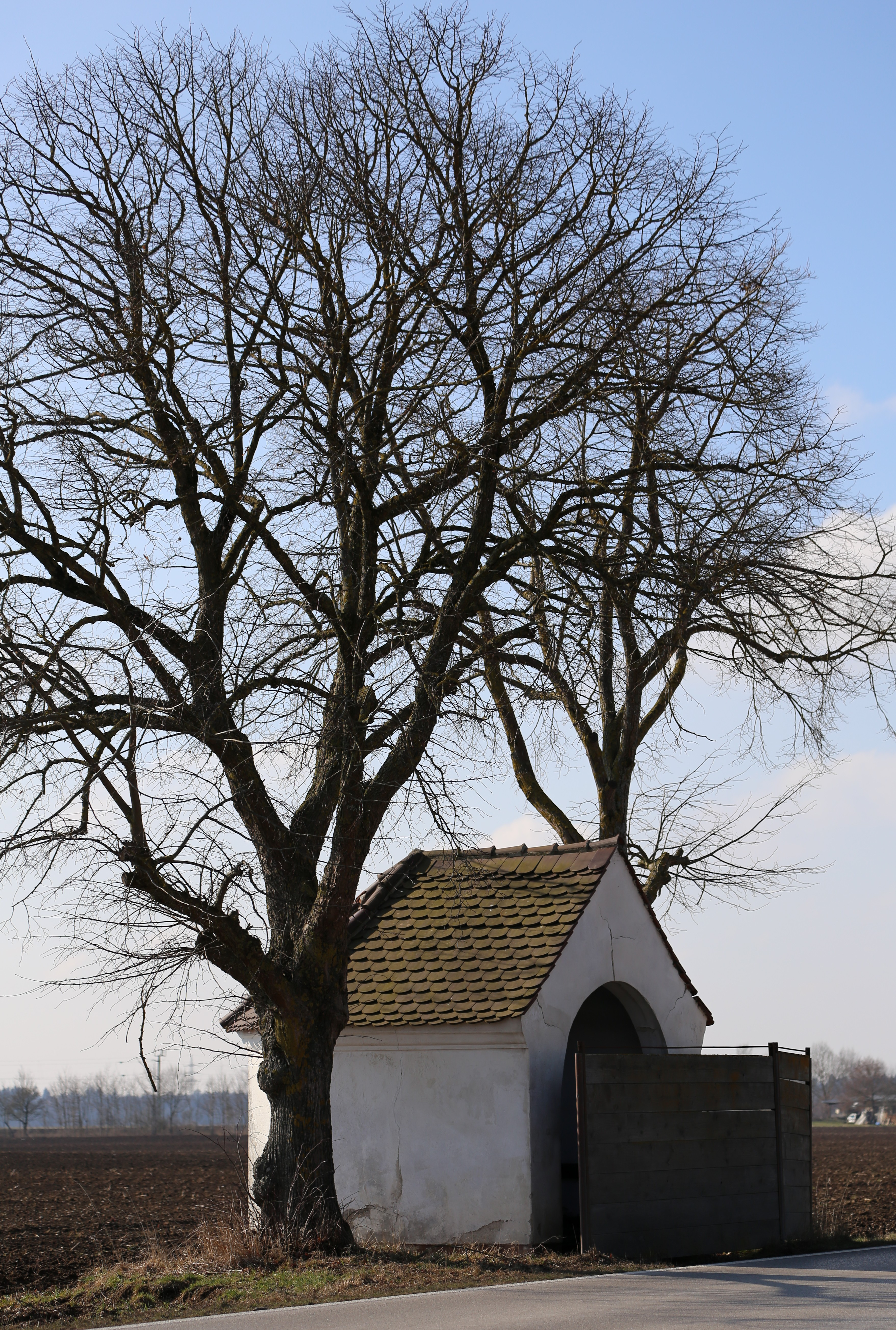 Siegertsbrunner Straße, Hohenbrunn; Gedenkkapelle, schlichte breite Nischenkapelle mit profiliertem Traufband, um 1840